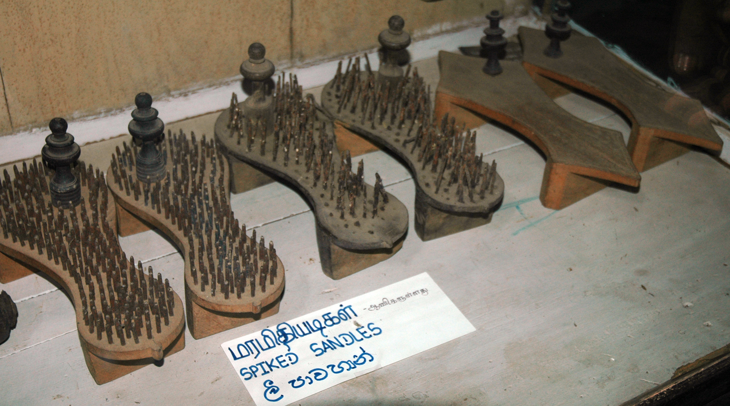 மர (ஆணிகளுள்ள) மிதியடிகள் - தொல் பொருட்காட்சிச்சாலை, யாழ்ப்பாணம்